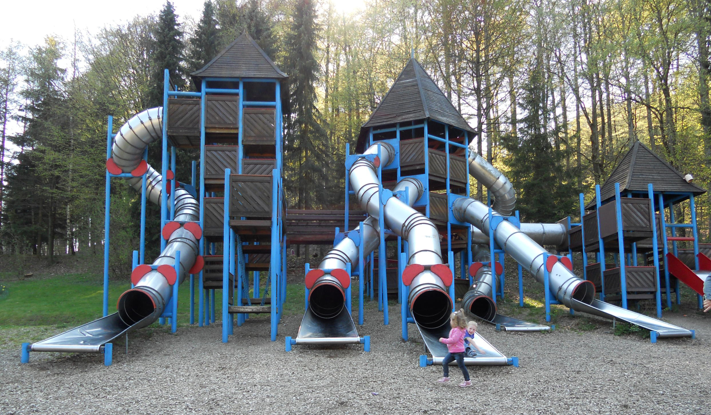 Rutschanlage im Fort Fun in Bestwig